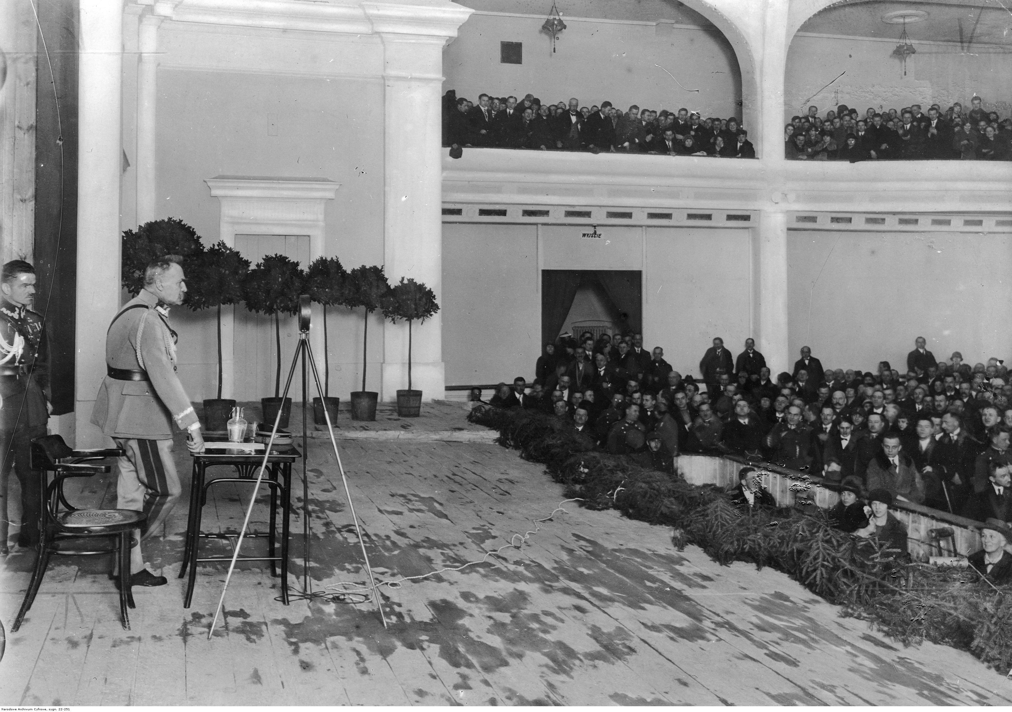 Odczyt marszałka Józefa Piłsudskiego pt. "Naczelny wódz w teorii i praktyce" wygłoszony w sali Coloseum. Widoczny także porucznik Michał Galiński (1. z lewej).